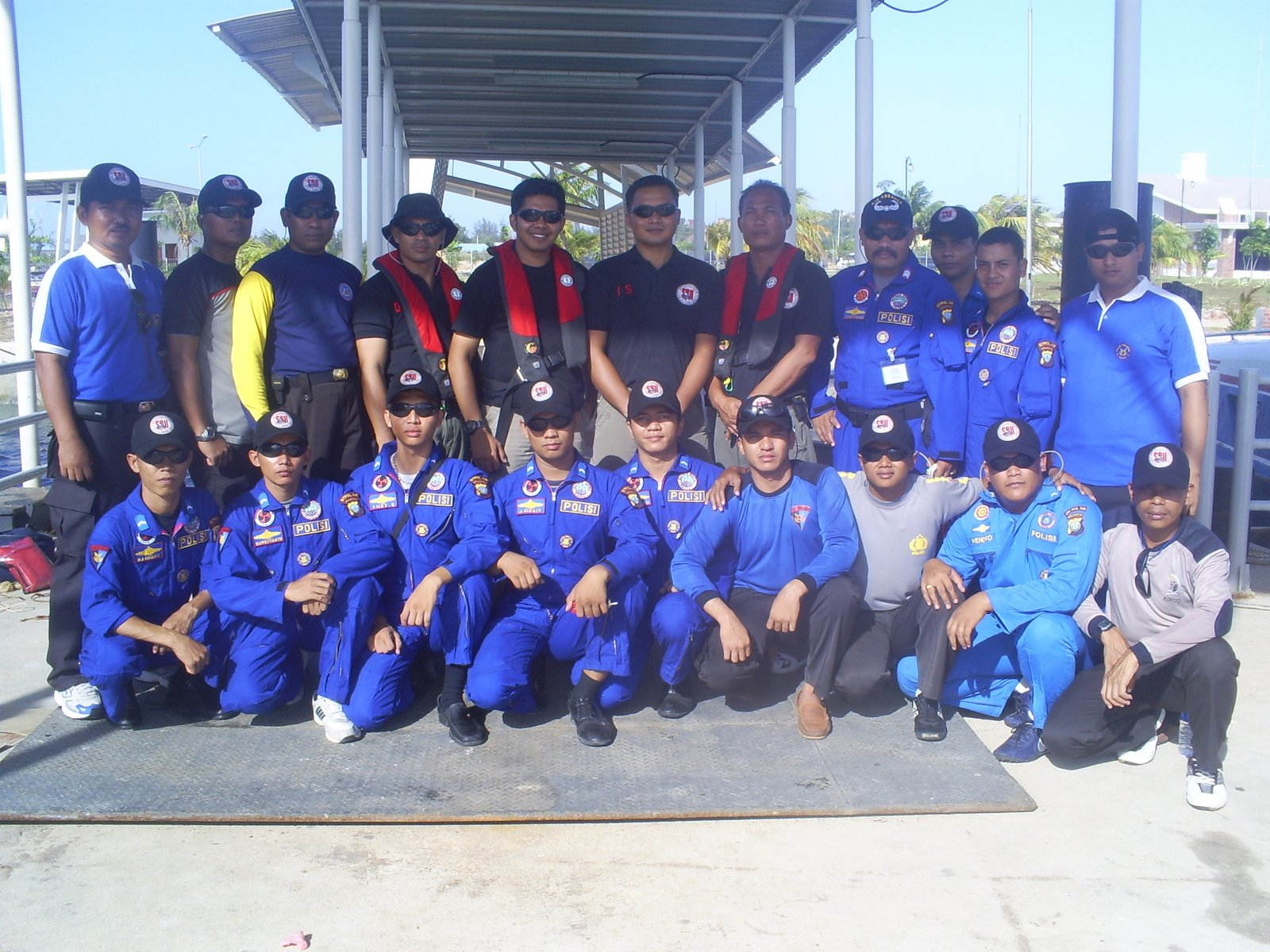 Prajurit Polairud